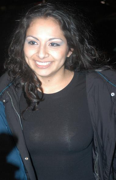 Mar 7 2006: Porn Star Karaoke